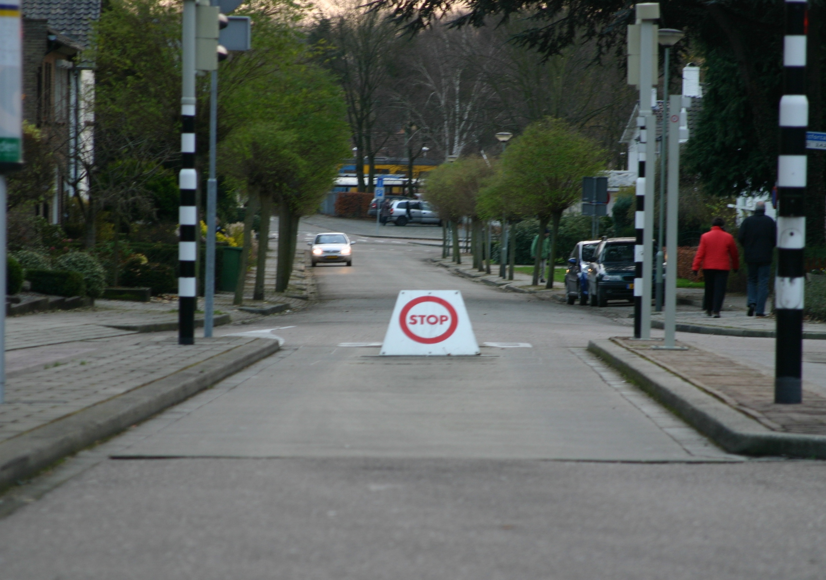 Eng Busschleis mat Poller zu Valkenburg. Kategorie:Stroosseverkéier